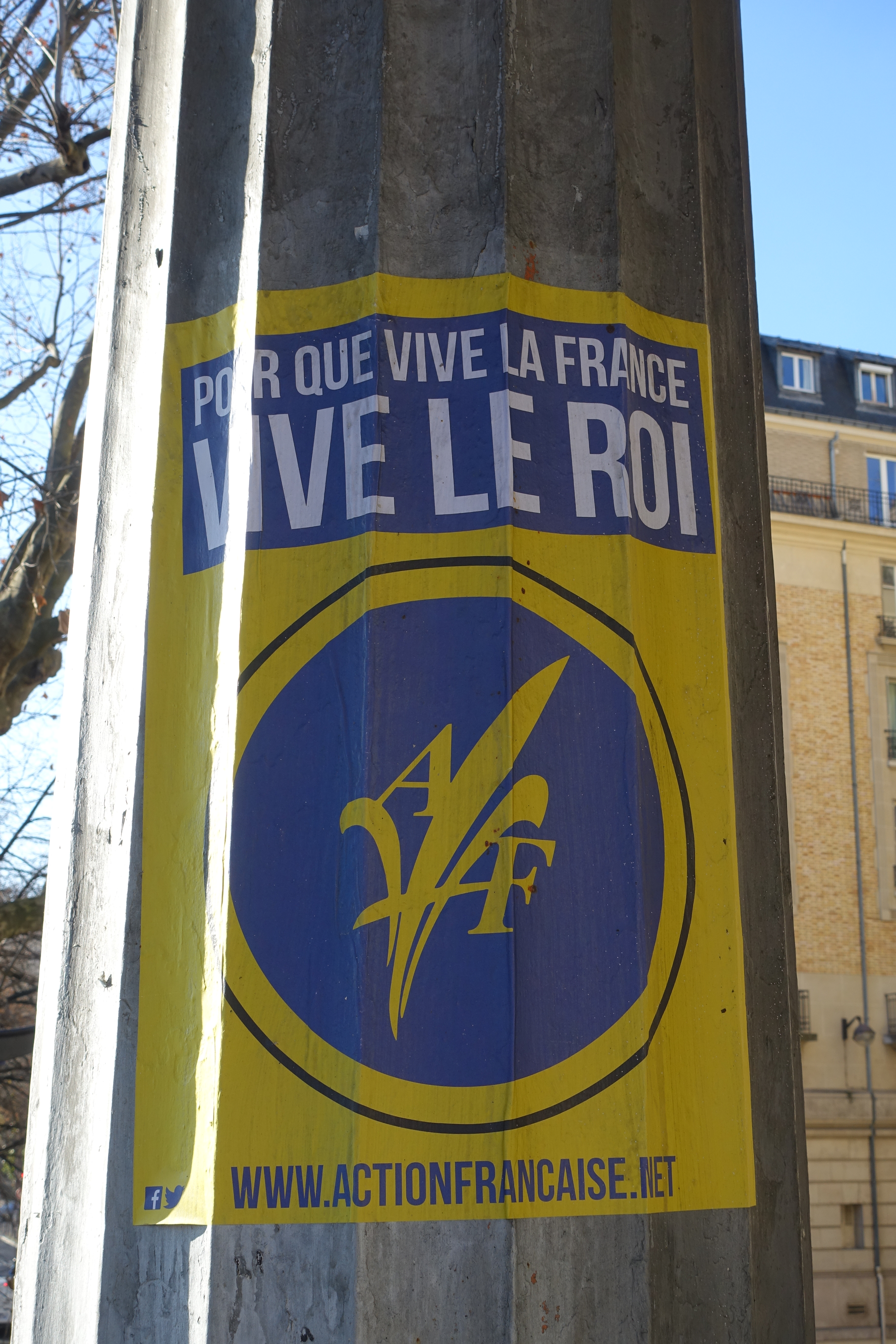 "Vive le Roi" @ Royalist poster @ Pont de Bir Hakeim @ Paris